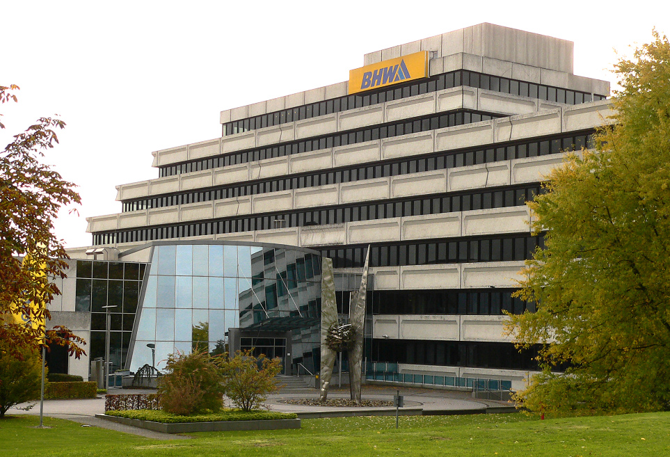 BHW in Hameln